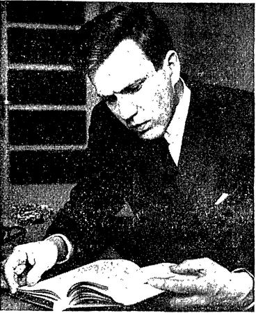 Jerker A. Eriksson noin vuonna 1966